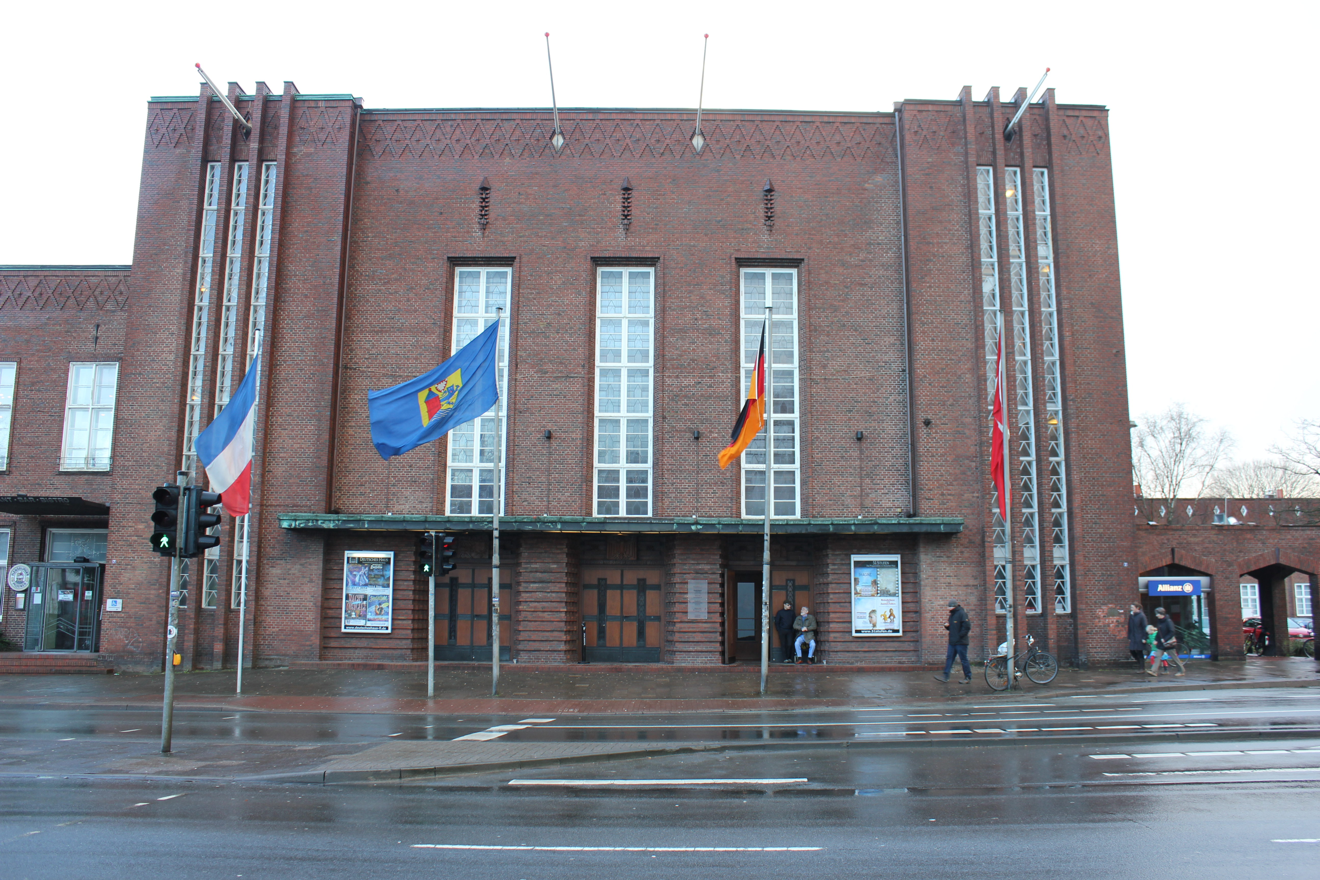 Das Deutsche Haus zum Neujahrsempfang der Stadt Flensburg (2014), Bild 02; auf dem Bild ist auch eine Flensburgfahne zu sehen